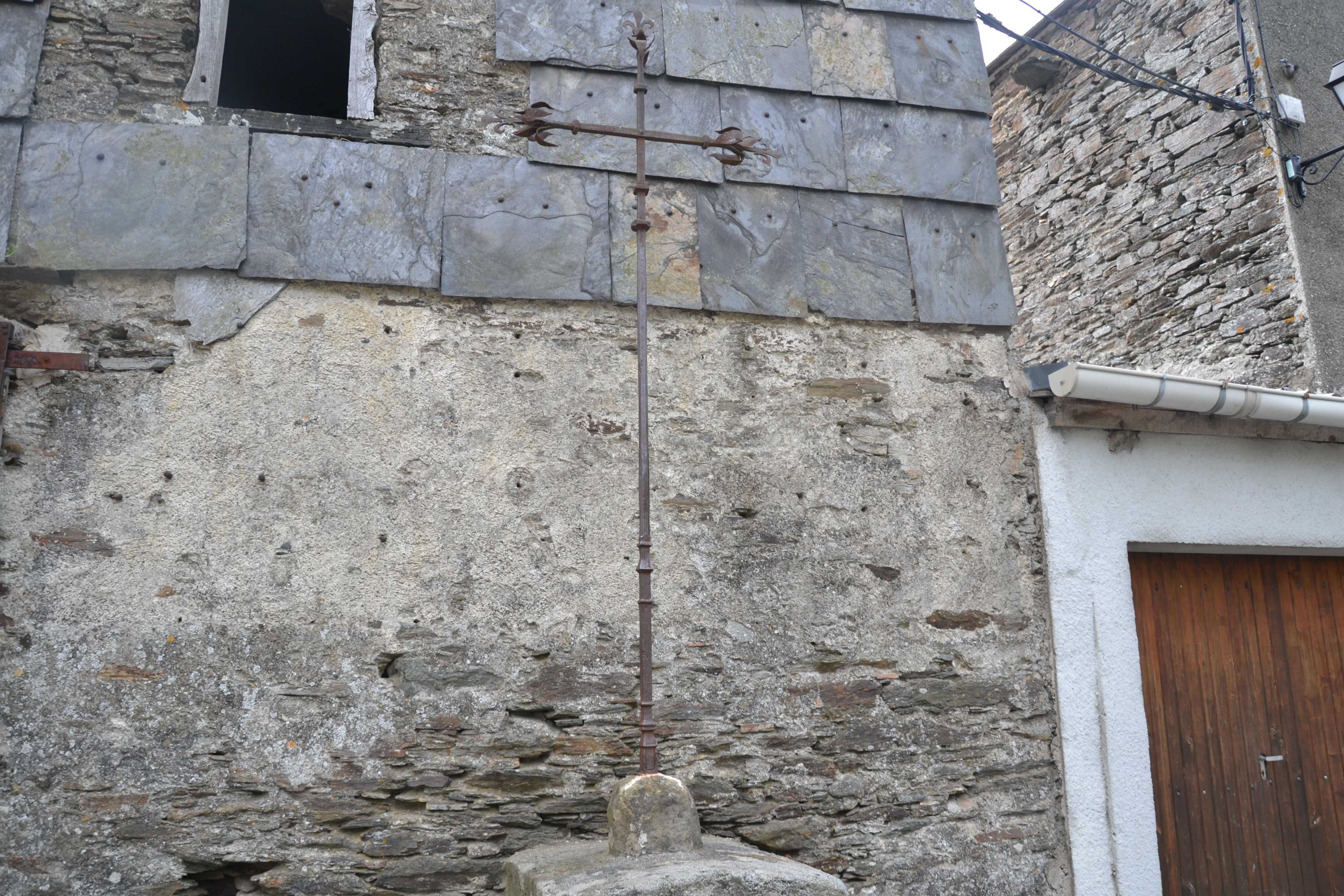 Croix du 16e de la place de La Tourette (Aude, France)